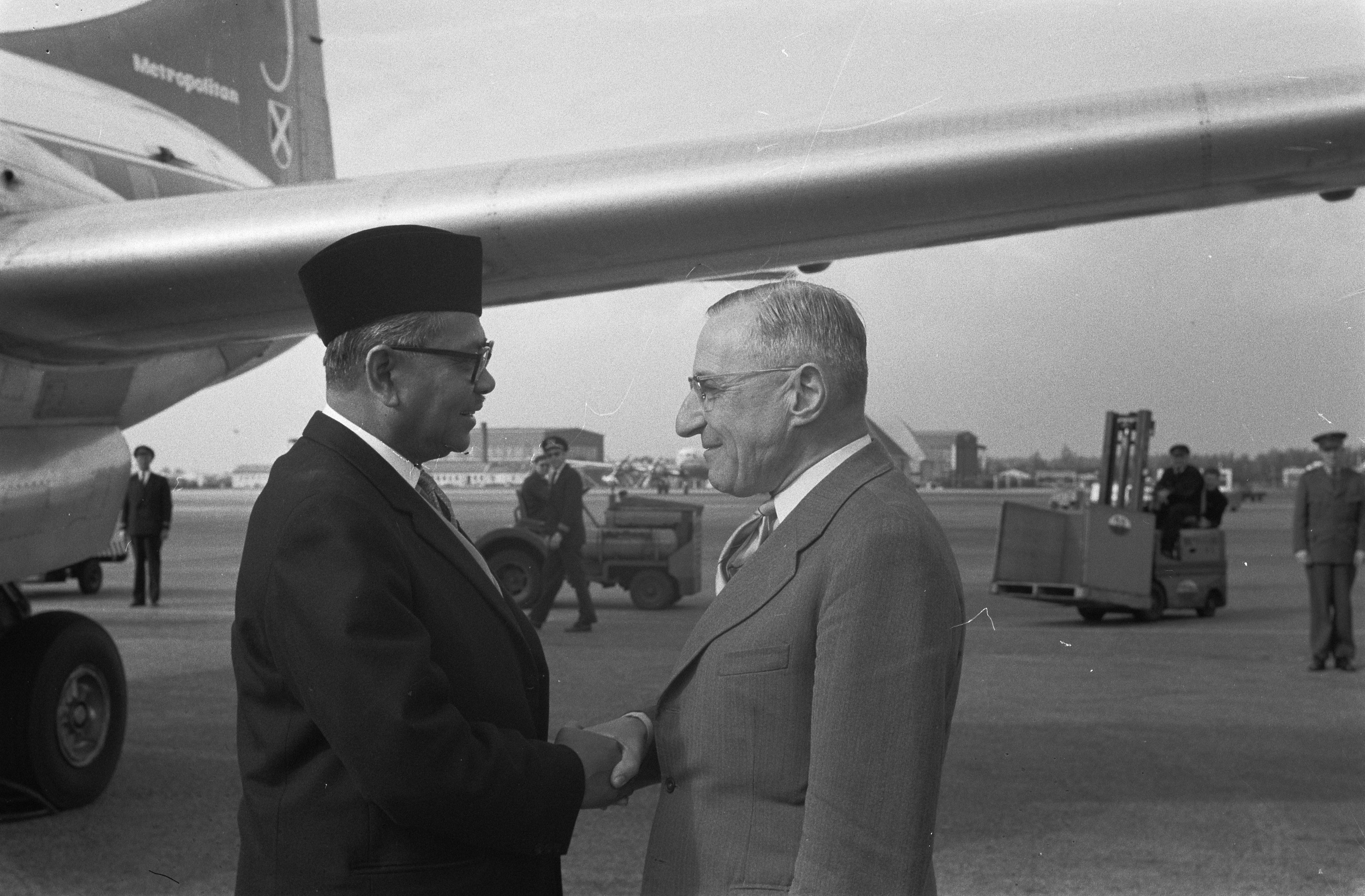 Collectie / Archief : Fotocollectie Anefo Reportage / Serie : [ onbekend ] Beschrijving : Aankomst van premier van Malakka Abdul Rahman , premier De Quay was ter begroeting aanwezig Datum : 26 mei 1960 Locatie : Malakka, Maleisië Trefwoorden : aankomsten, begroetingen, premiers Persoonsnaam : Abdul Rahman Fotograaf : Pot, Harry / Anefo Auteursrechthebbende : Nationaal Archief Materiaalsoort : Negatief (zwart/wit) Nummer archiefinventaris : bekijk toegang 2.24.01.05 Bestanddeelnummer : 911-2805